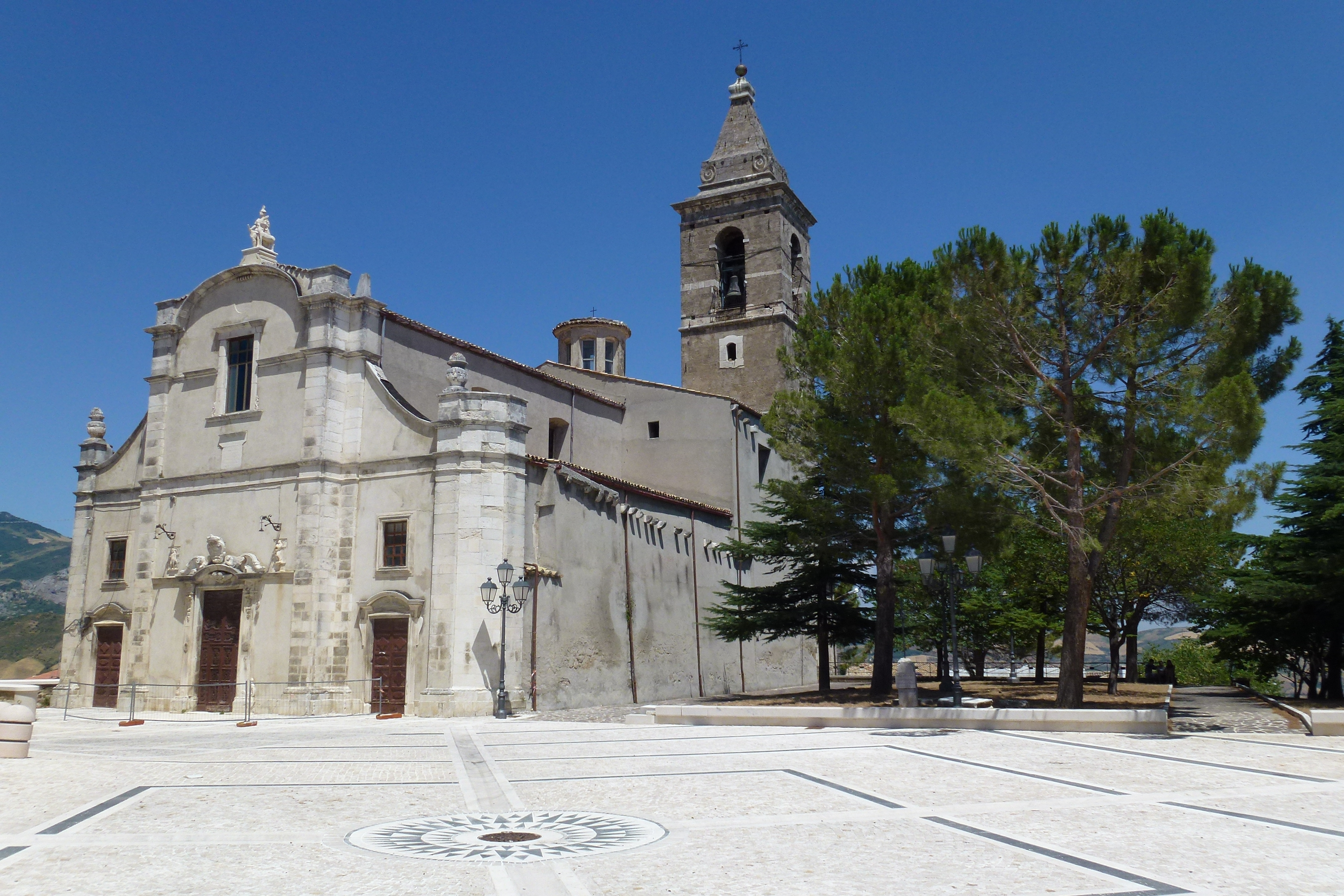 La Chiesa